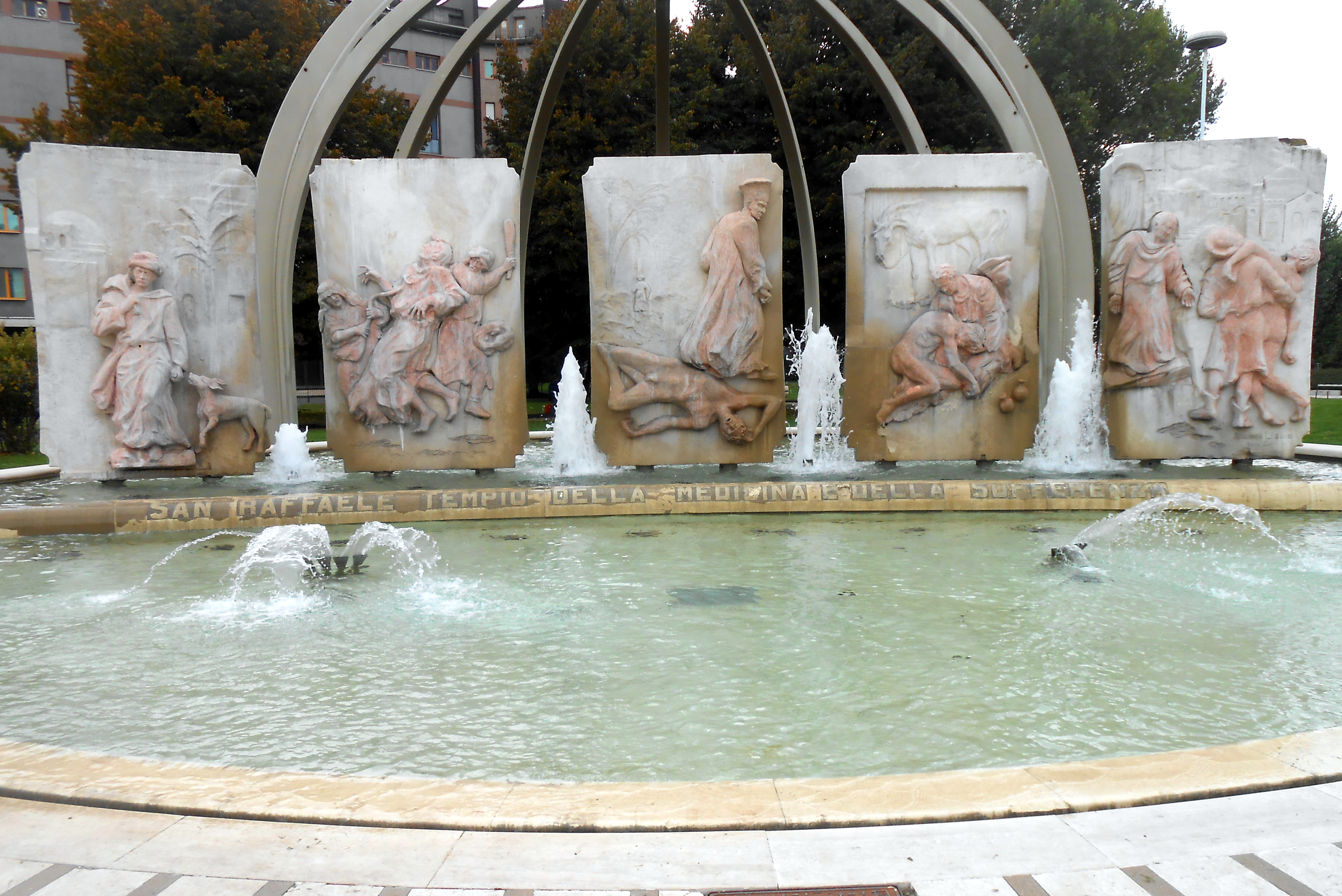 Parable of the Good Samaritan